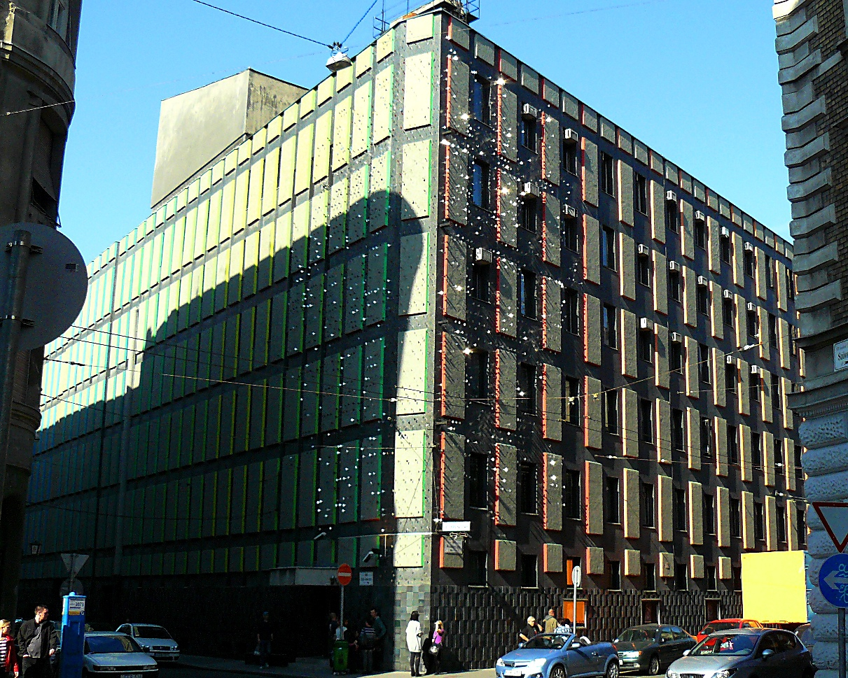 Pesti Magyar Színház művészbejárója: Wesselényi utca - Rejtő Jenő utca sarok